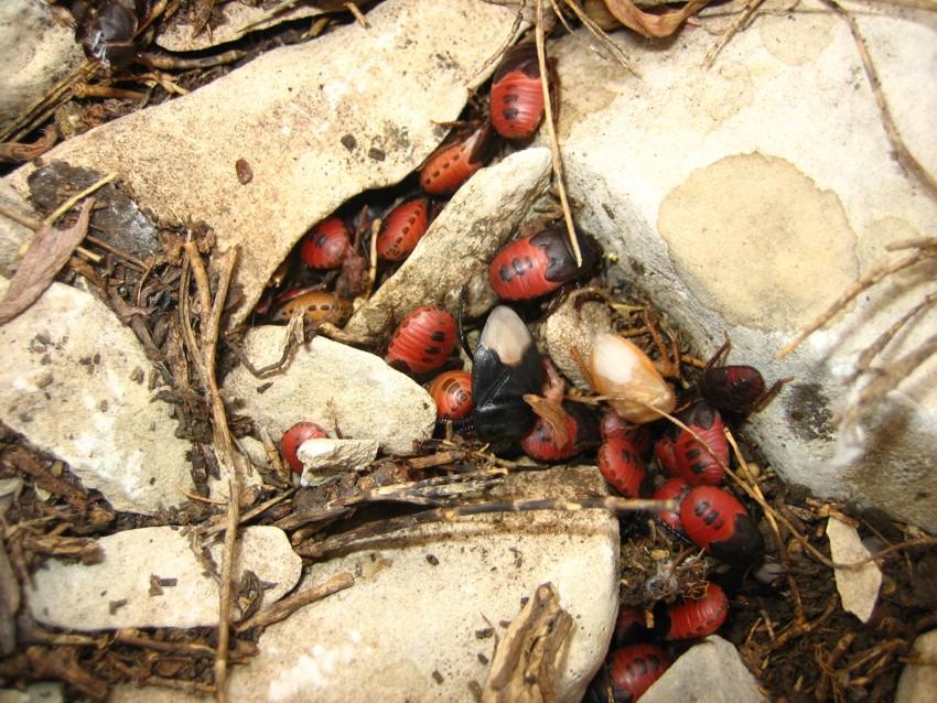 Cydnus aterrimus (Heteroptera: Cydnidae), ninfas (rojo) adultos (negro). Ports de Tortosa Beseit, Tarragona. (det. J. P. Valcárcel)